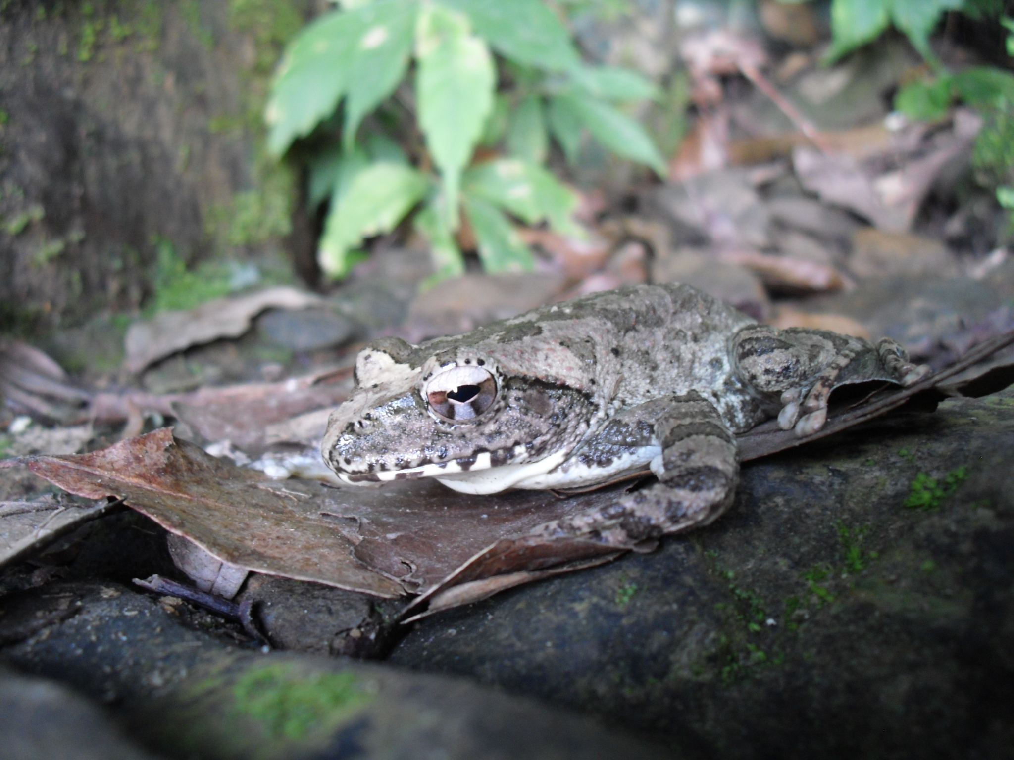 中文（台灣）: 褐樹蛙（母），學名：Buergeria robusta，拍攝於銀河洞越嶺登山步道。